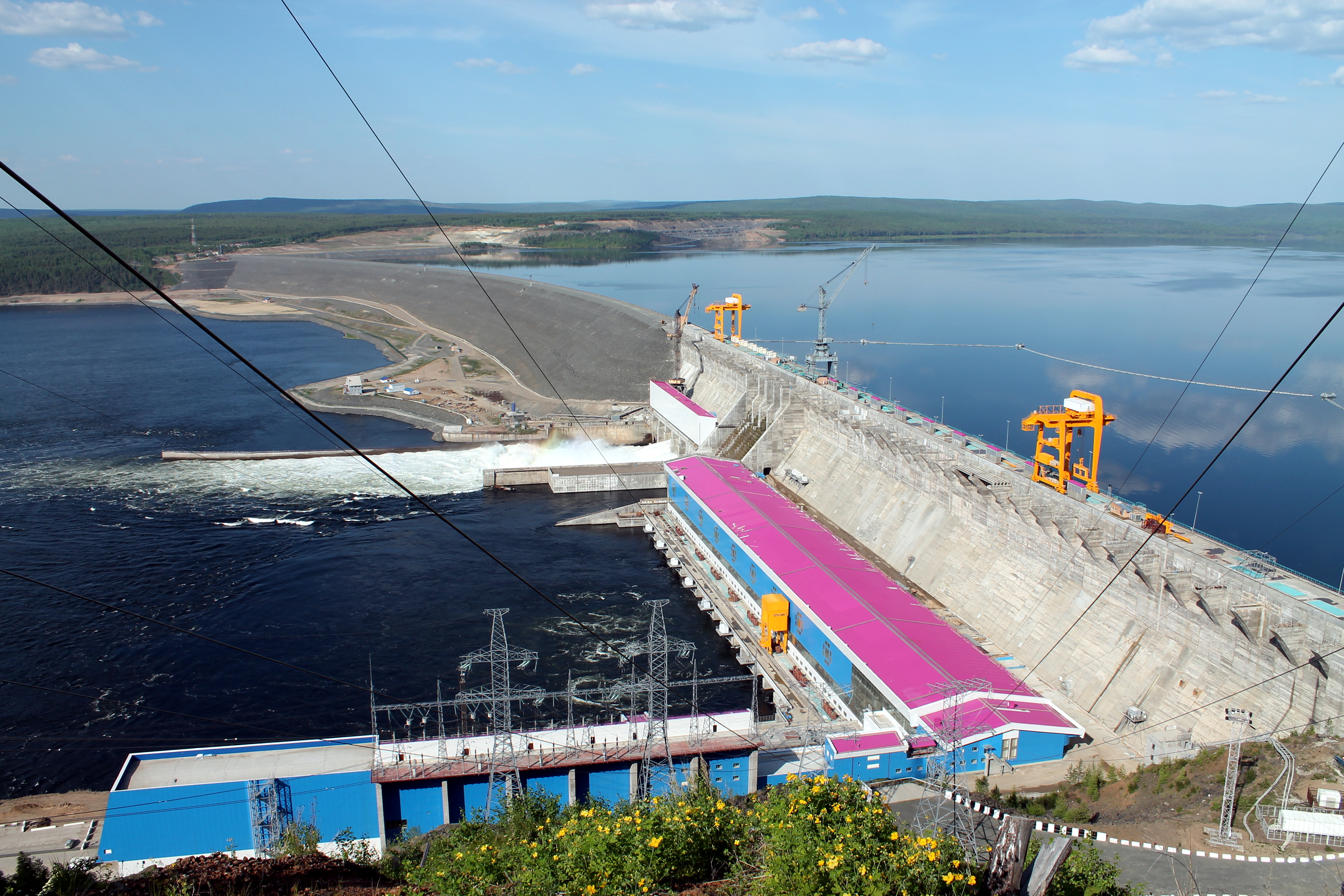 Богучанская ГЭС